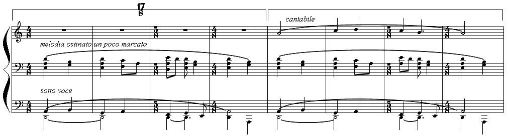 Stantchinsky - 6ème esquisse - 17 temps